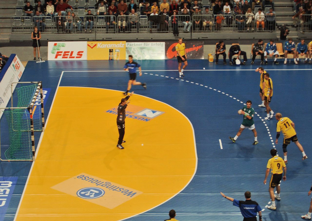 Handball: 7-Meter (SG Kronau/Östringen - HSG Wetzlar)